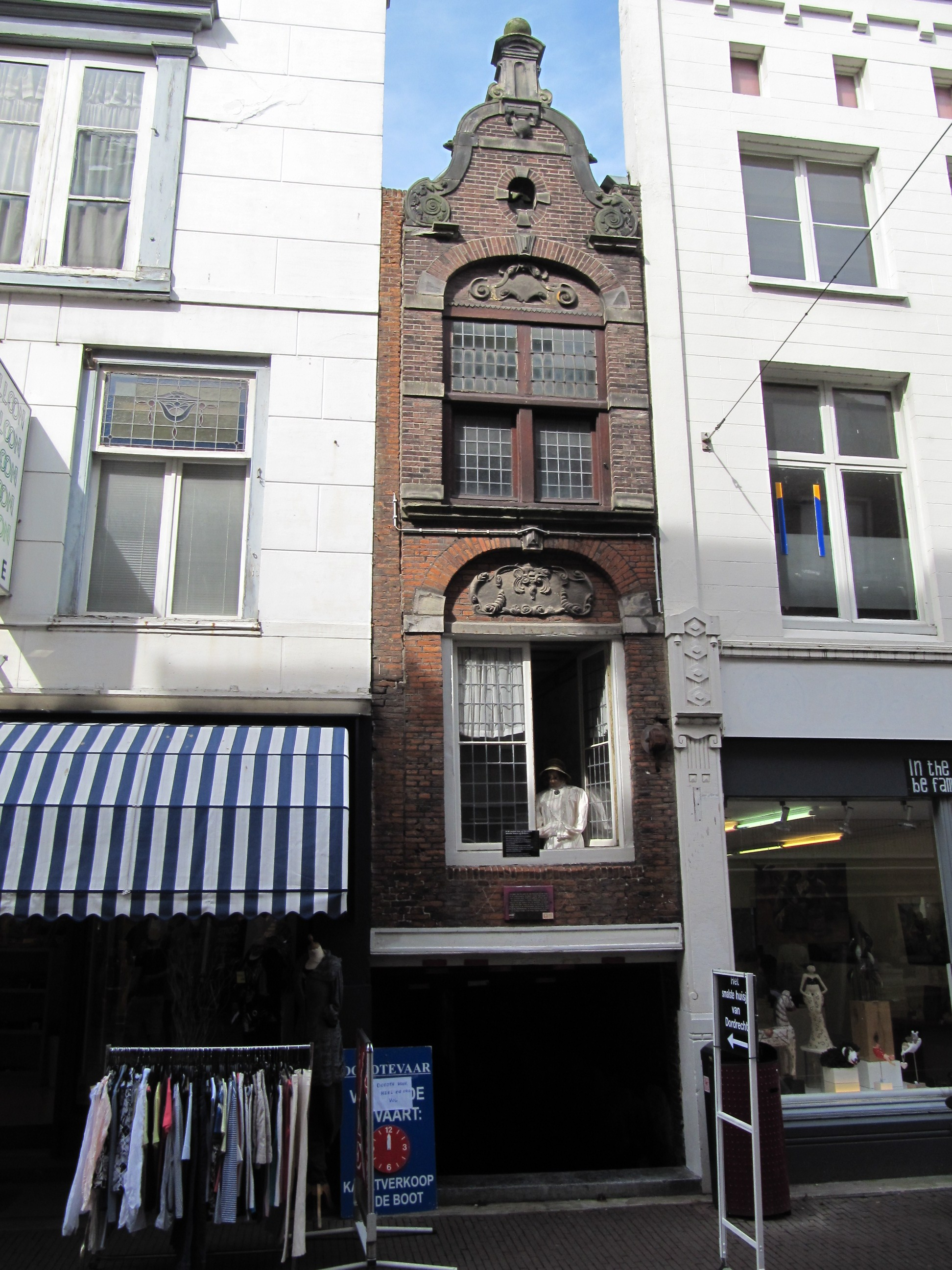 RM13796 Dordrecht - Voorstraat 265.jpg